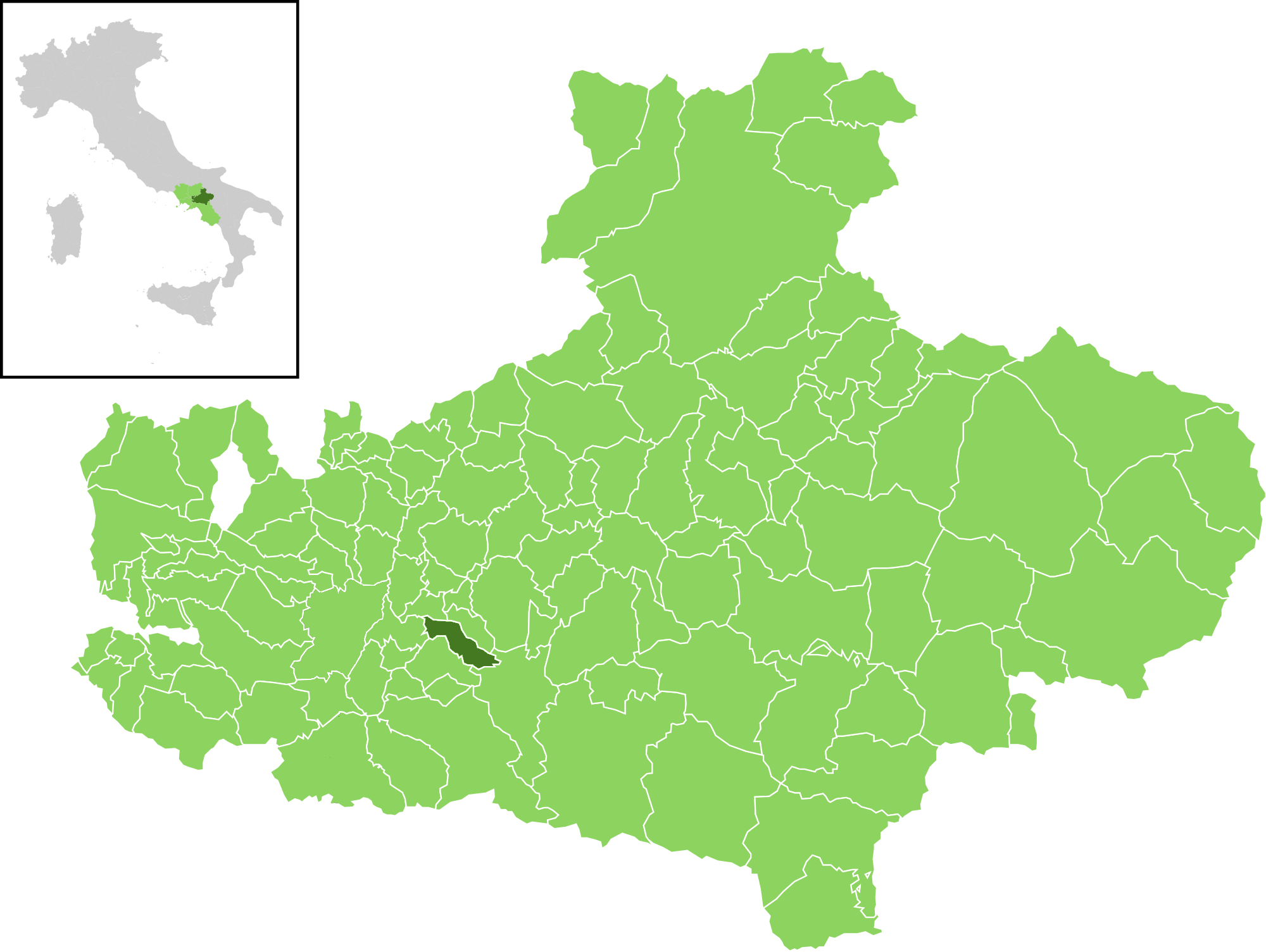 Posizione del comune all'interno della provincia di Avellino